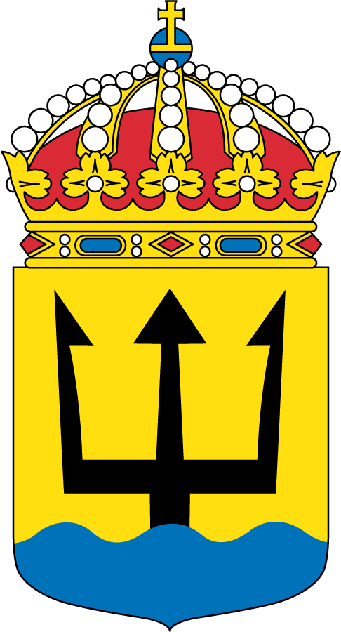 Första_ubåtsflottiljen